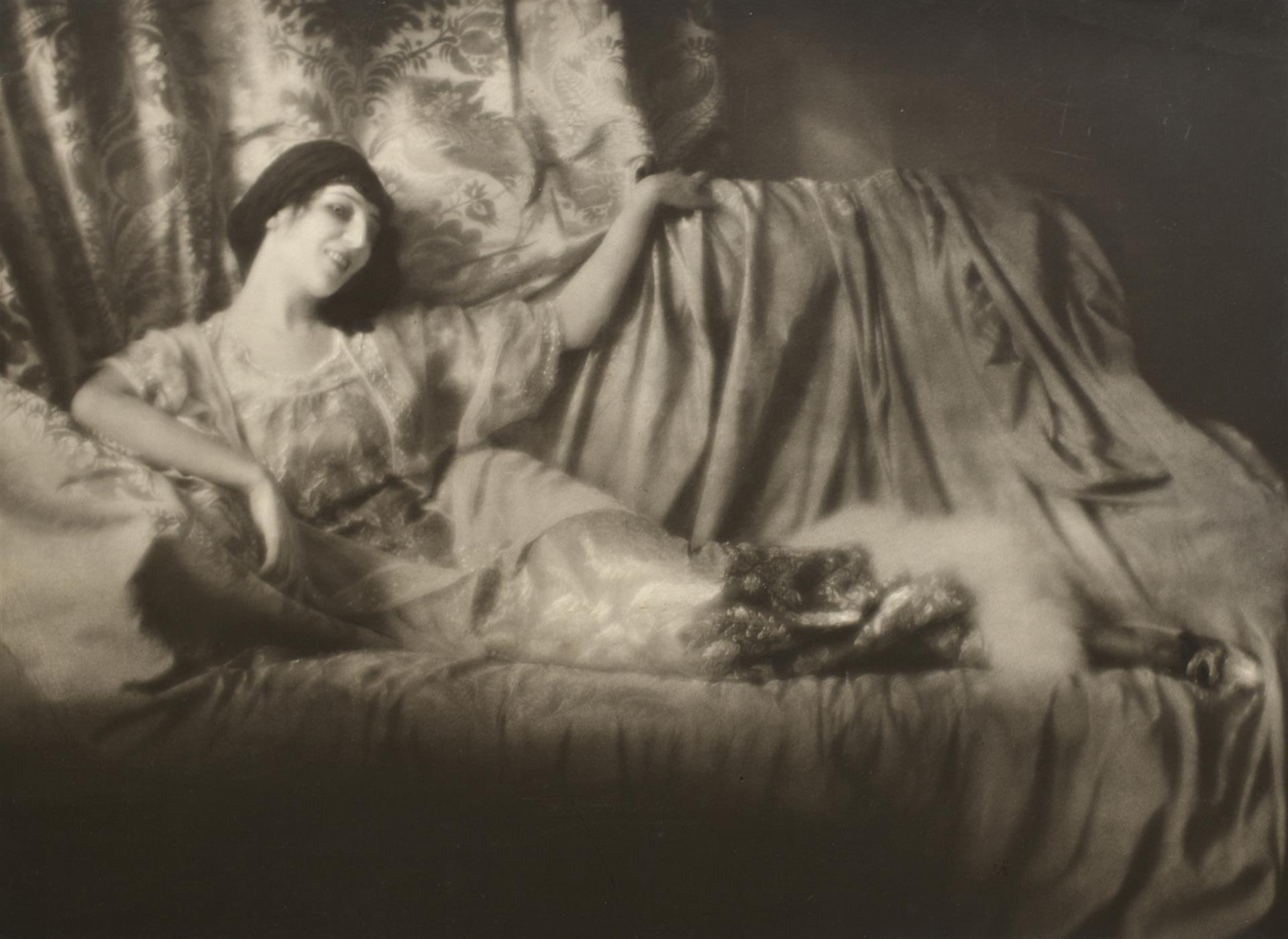 Ida Rubinstein dans La Pisanelle ou la Mort Parfumée, vente aux enchères "Photographies par Otto Wegener (1849-1924)" à Hôtel de vente Drouot le 8 novembre 2018